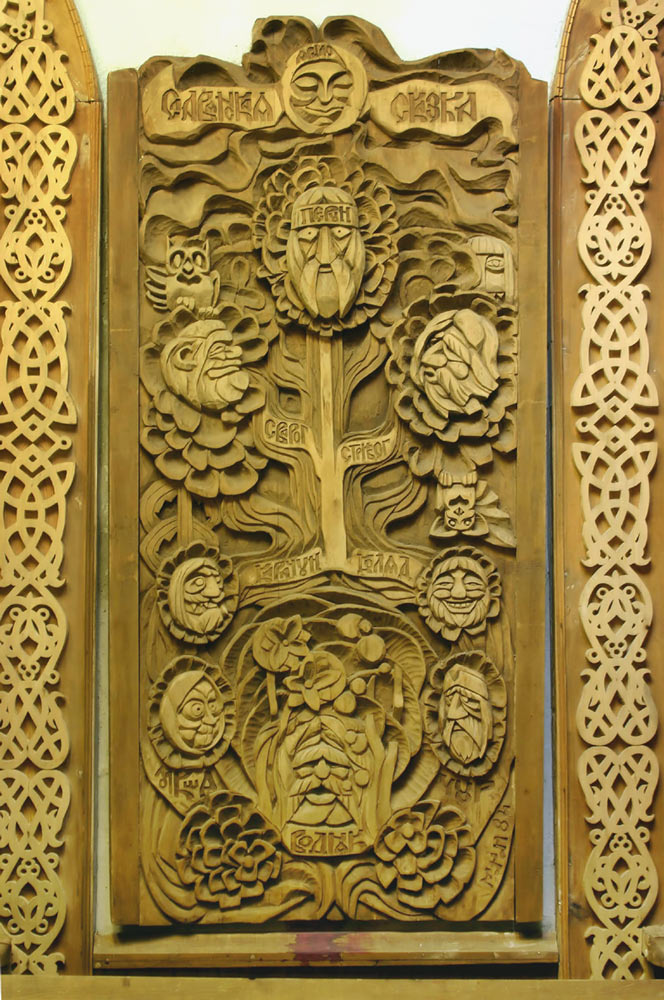 Диплом Минина Павла "Славянская сказка"